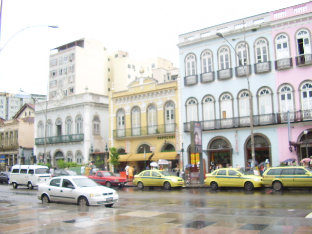 Catete street